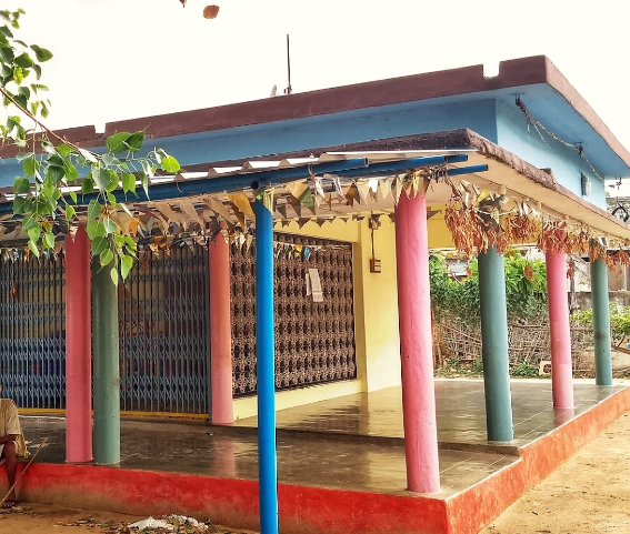 మంగళంపల్లి రామాలయం